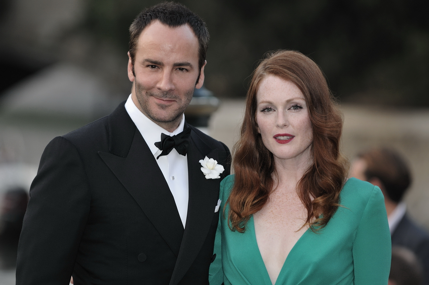 66ème Festival du Cinéma de Venise (Mostra), 10ème jour (11/09/2009) Arrivée au Lido de Colin Firth, Julianne Moore, Matthew Goode et le réalisateur Tom Ford pour le film : A sigle Man